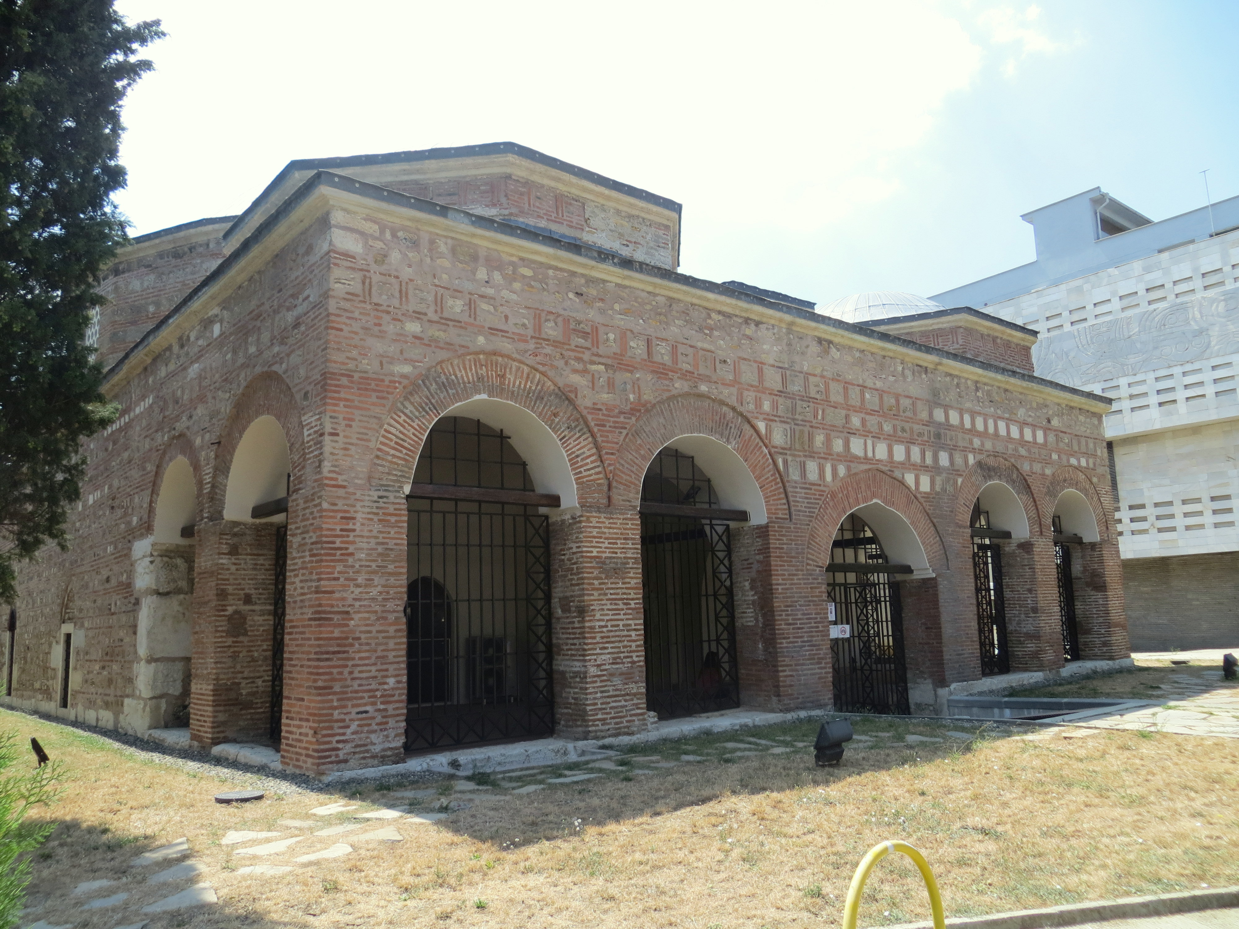 Die zentralbulgarisch Großstadt Stara Zagora